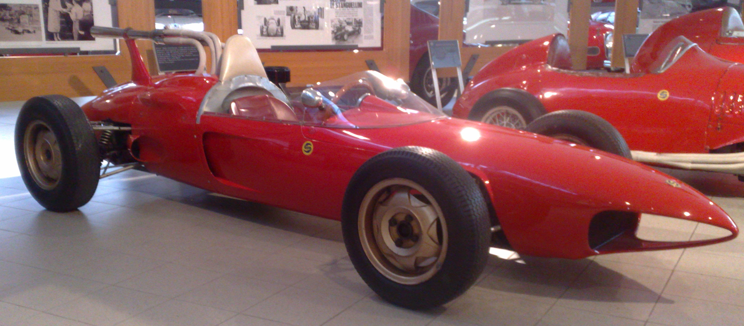 Stanguellini Delfino